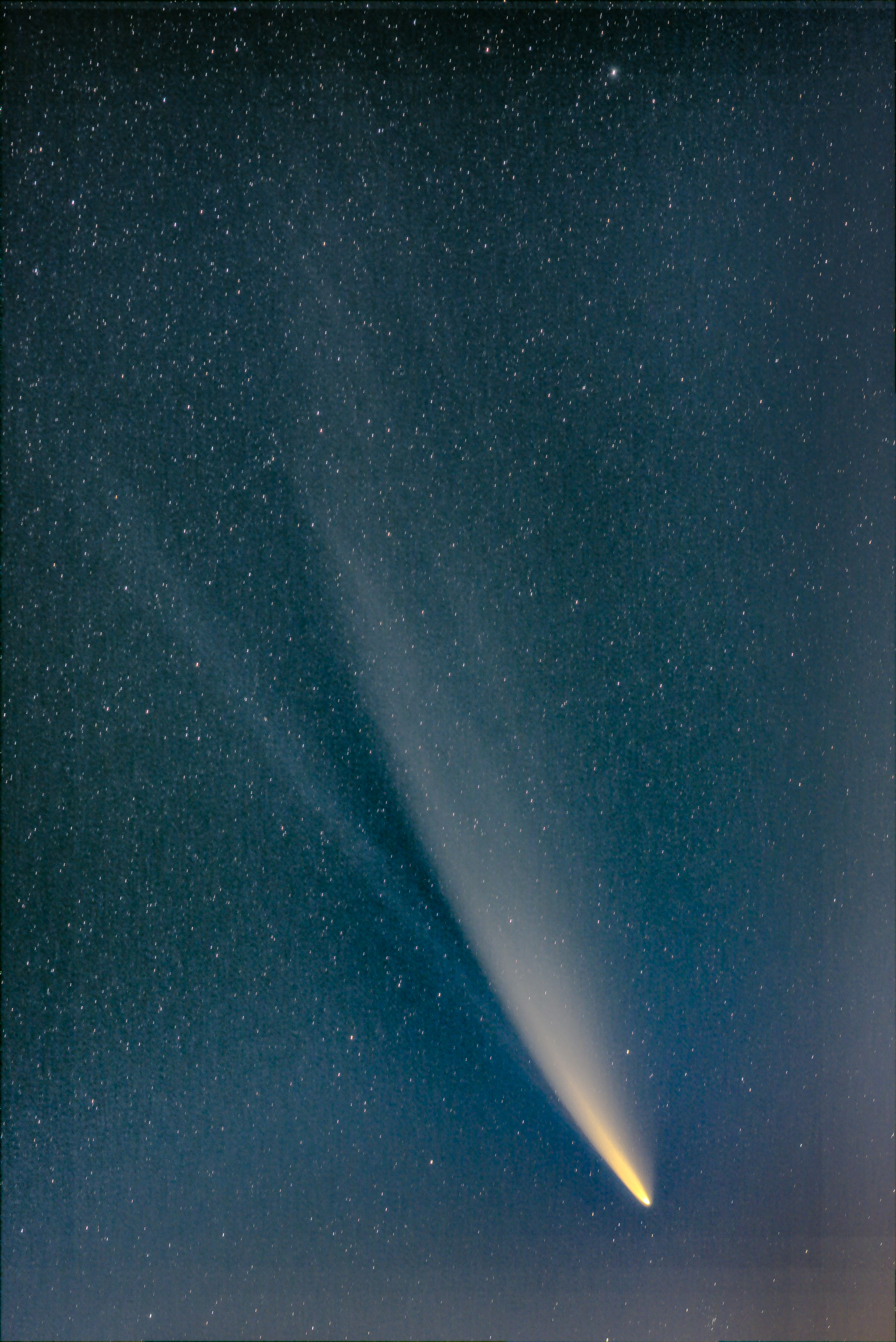 сума 66 x 7 sec + 27 x 2 sec кадрiв Fujifilm X-T20 + Samyang 135/2